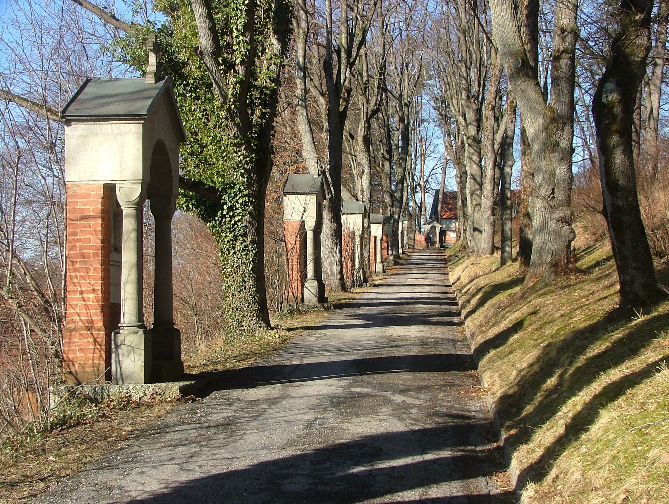 Obergünzburg